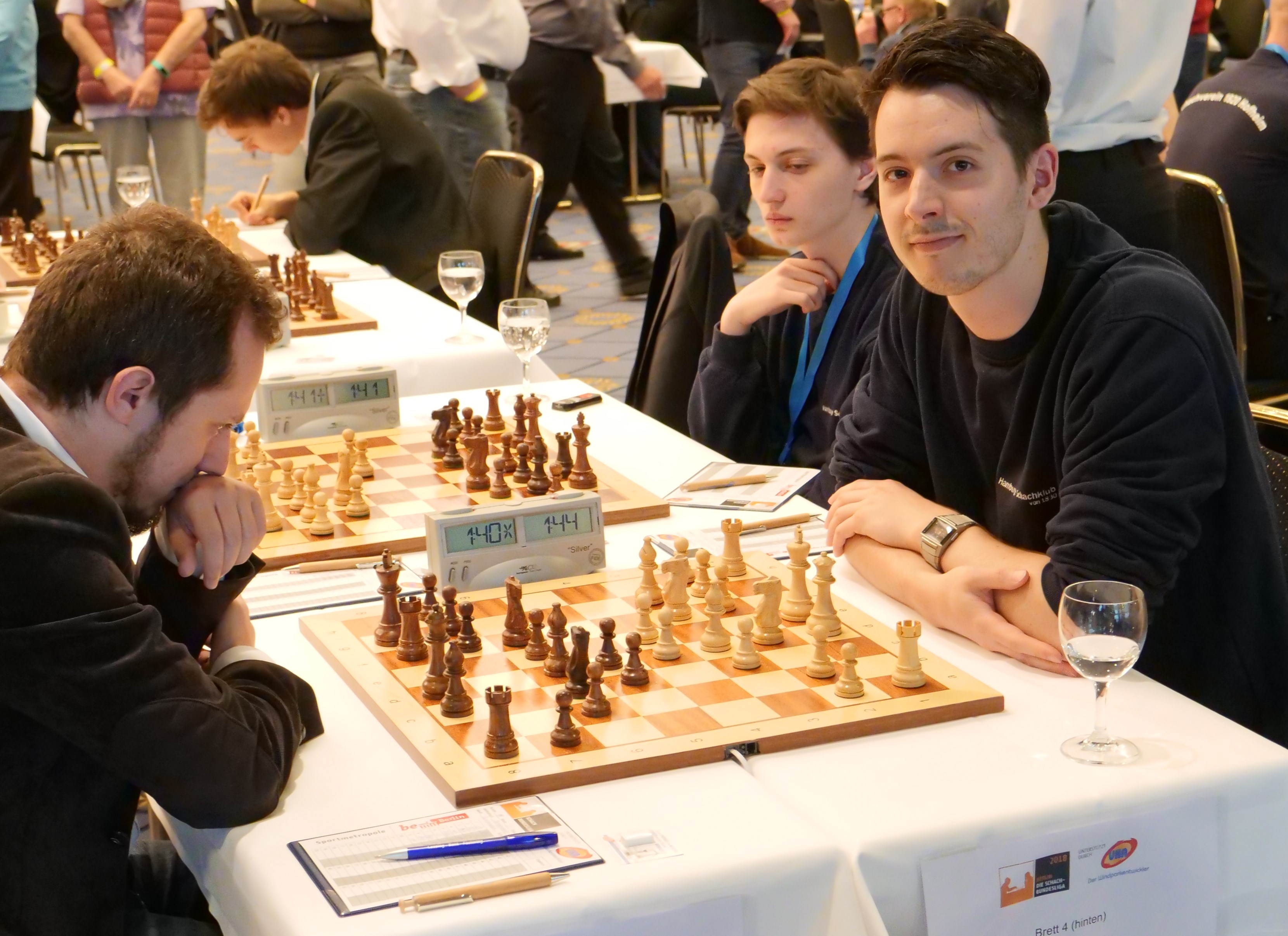 Huschenbeth Bundesliga-Endrunde 30-4-2018